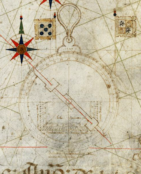 Astrolabe nautique : première representation, detail d'une carte de 1529.